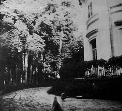 Беларуская (тарашкевіца): Шумск (Šumsk), сядзіба